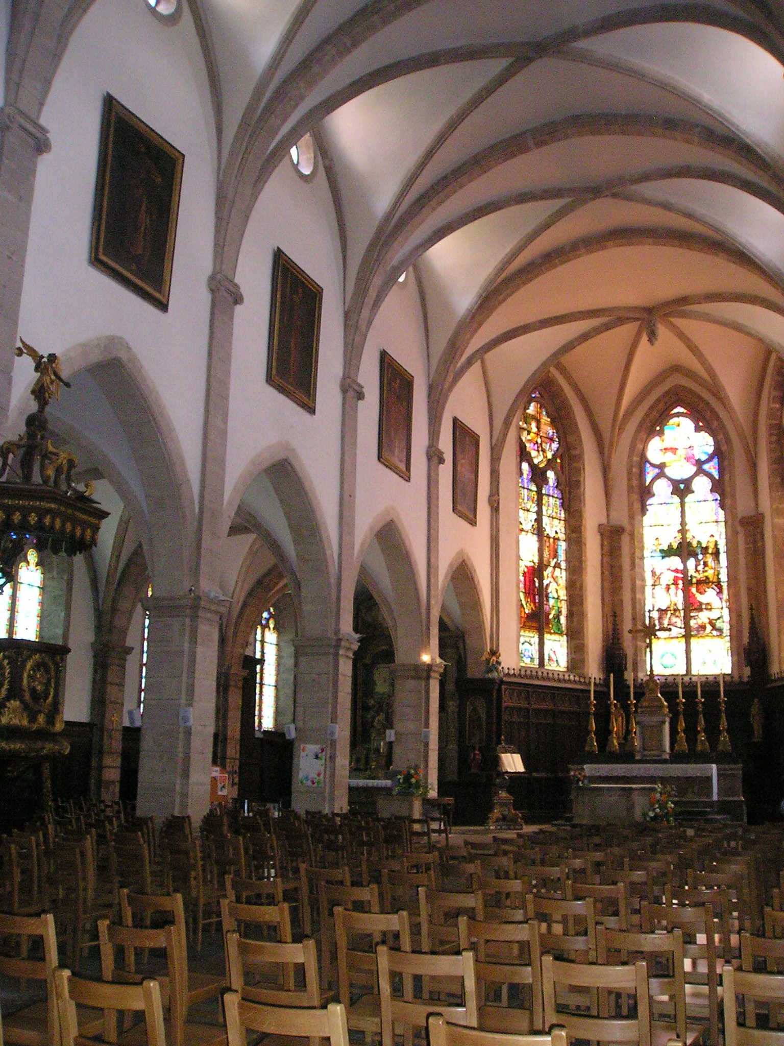 Baume-les-Dames, Saint-Martin innen